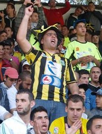 Supports de l'USM El Harrach